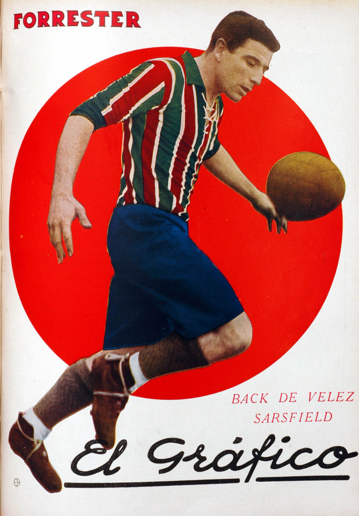 El Grafico del 23 de Julio de 1932. Edicion 680